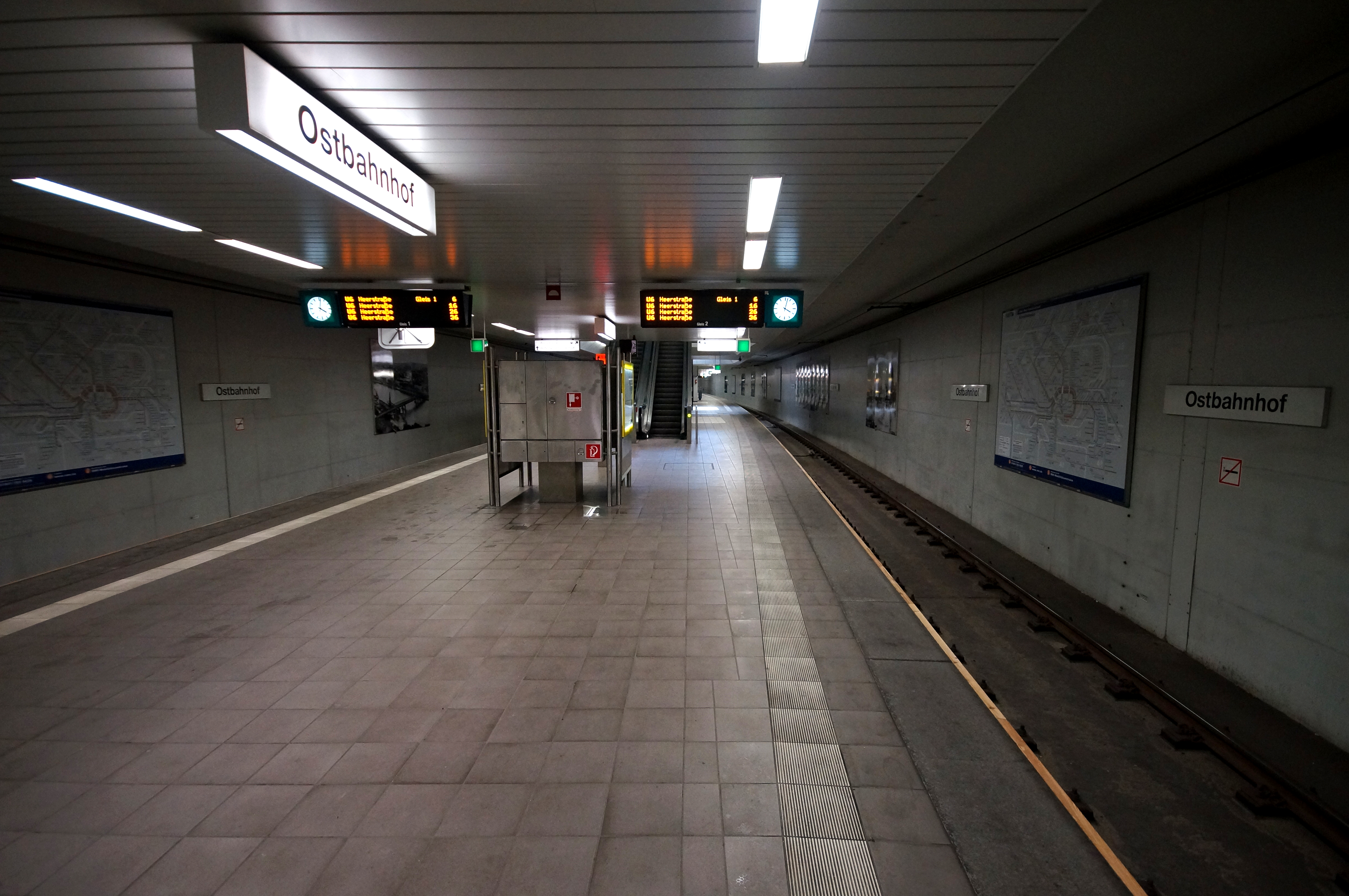 Die Bahnsteige des U-Bahnhofs Ostbahnhof des Bahnhofs Frankfurt (Main) Ost